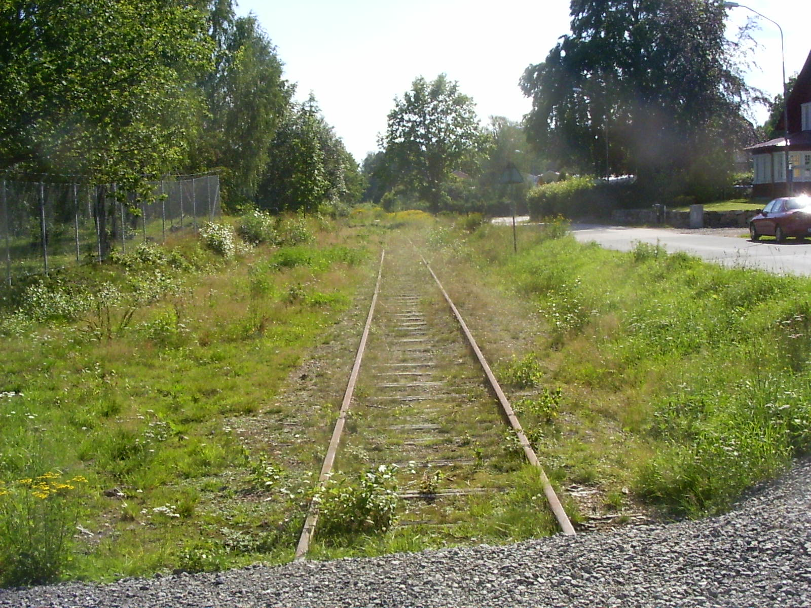 Åminne bruk (Helmershus 6:52 o 6:53)